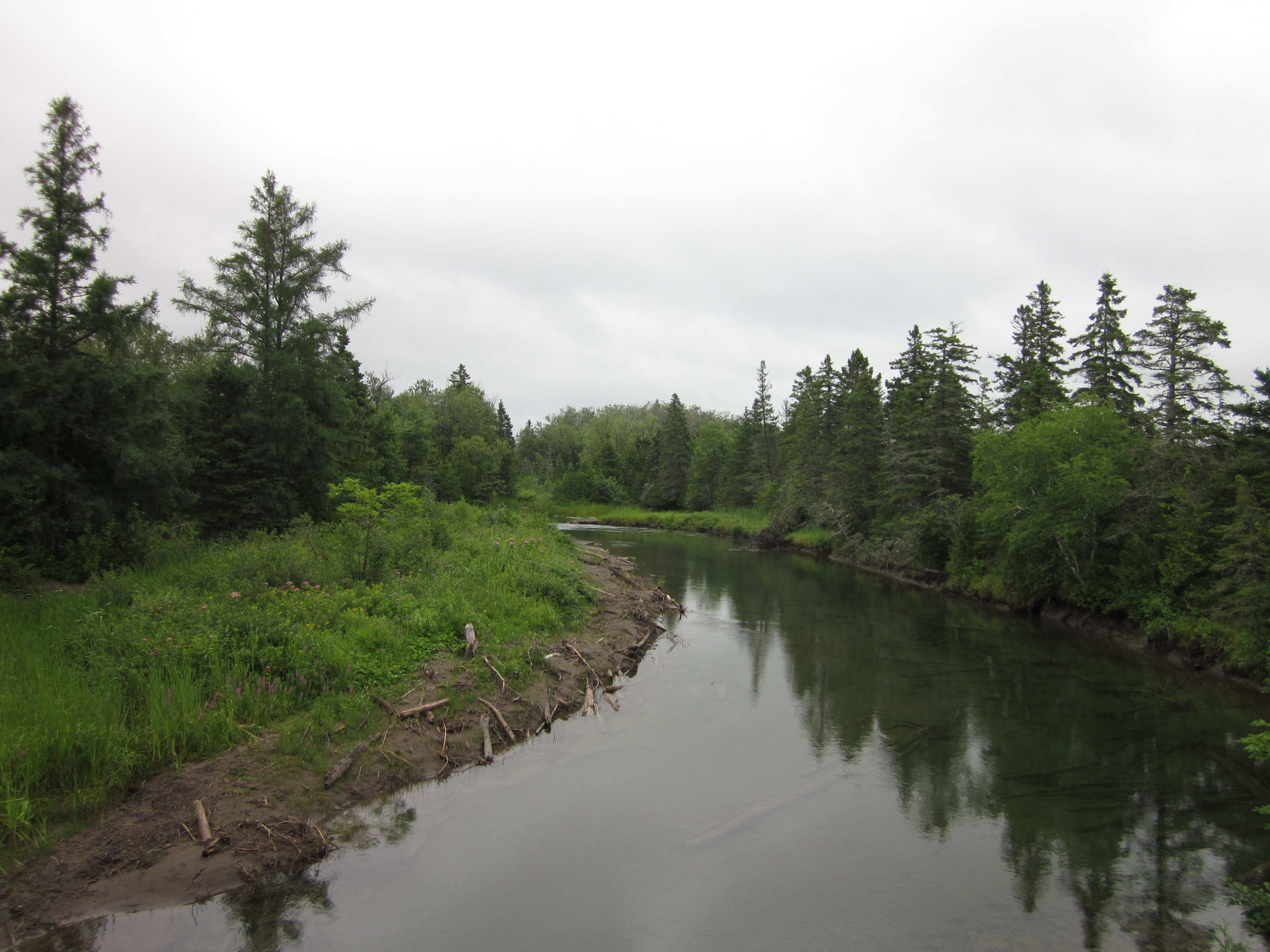 Rivière Bonaventure dans la réserve aquatique de l'Estuaire-de-la-Rivière-Bonaventure